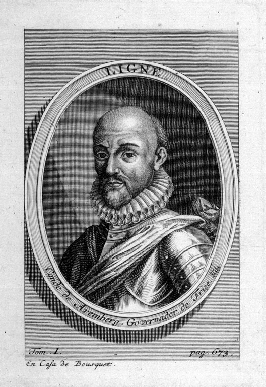 Graf Johann von Ligne, Freiherr von Barbançon, Reichsgraf von Arenberg (1525-1568), Statthalter von Friesland, Overyssel, Gröningen und Drenthe